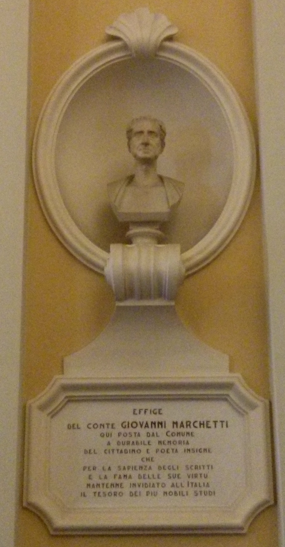 Giovanni Marchetti (1790–1852) - Busto di Giovanni Putti (1771–1847) e iscrizione del professor Fronduti - Municipio di Senigallia